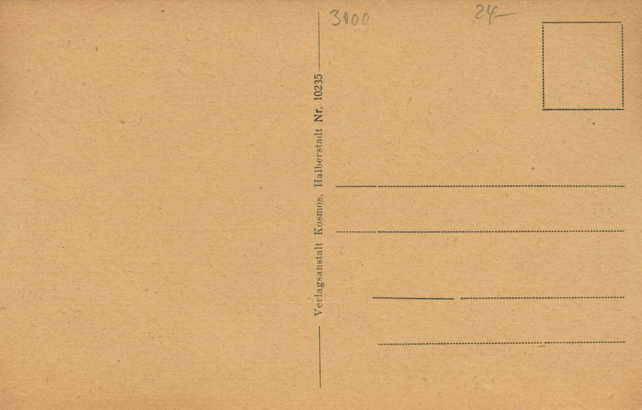 Rückseite der Ansichtskarte mit der laufenden "No. 10235" und sogenanntem "geteilten" Schreibfeld (ab 1905 in Gebrauch) ...